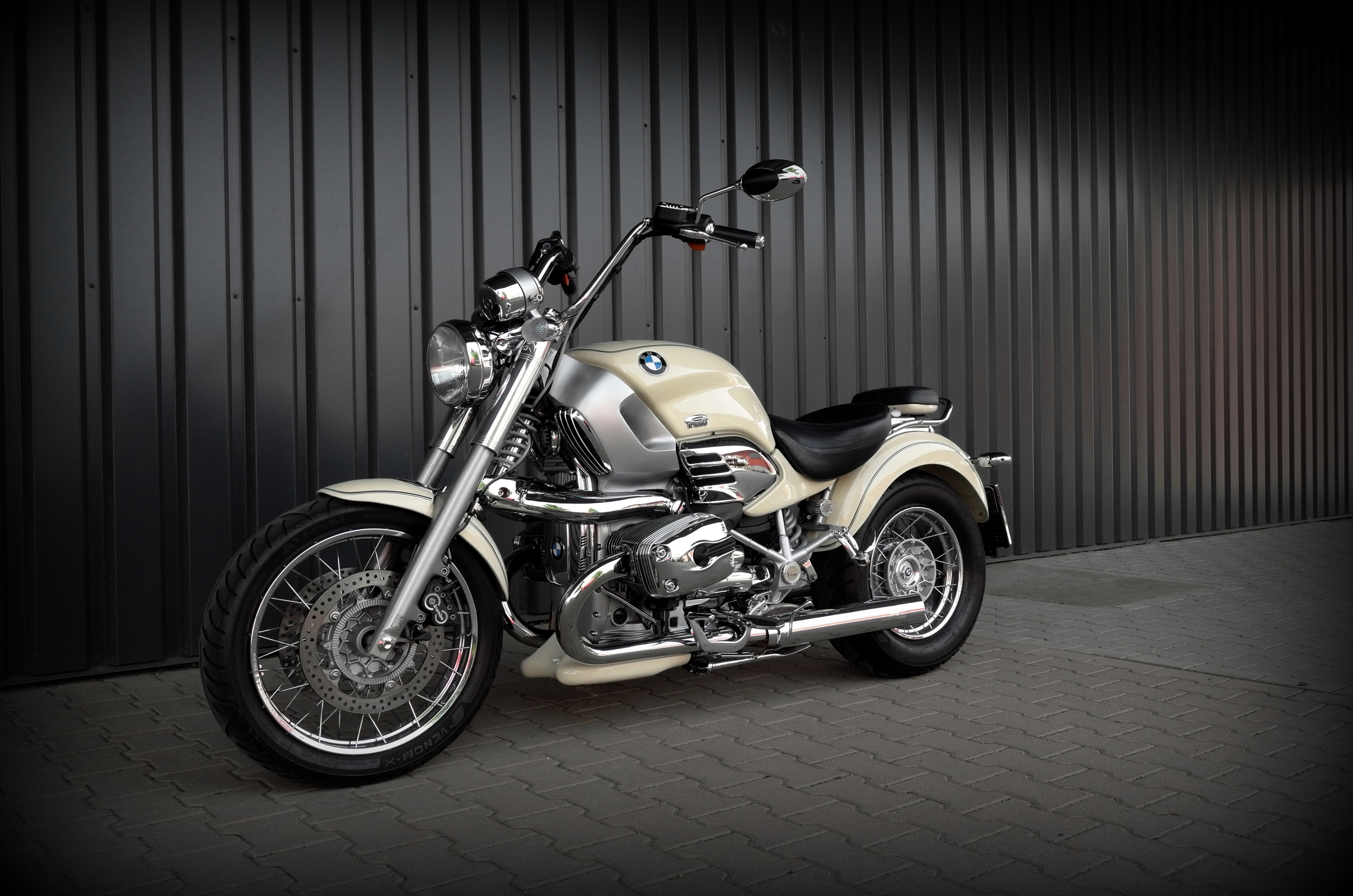 veredelt